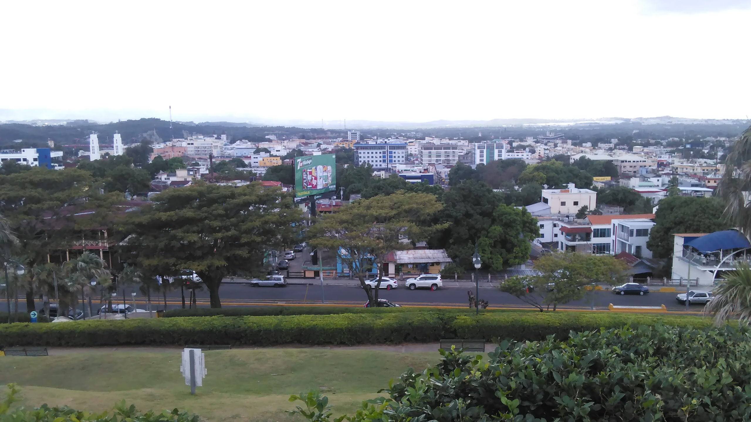 Casco Urbano de Santiago.